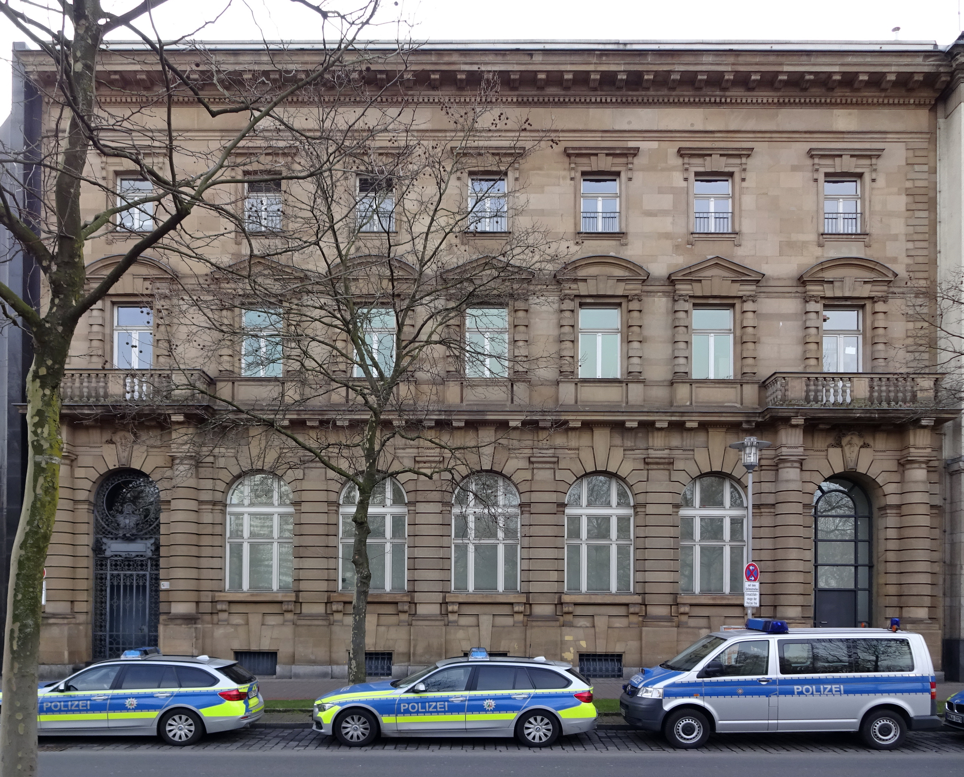 Ehemaliges Reichsbankgebäude, Heinrich-Heine-Allee 8-9, Düsseldorf-Altstadt